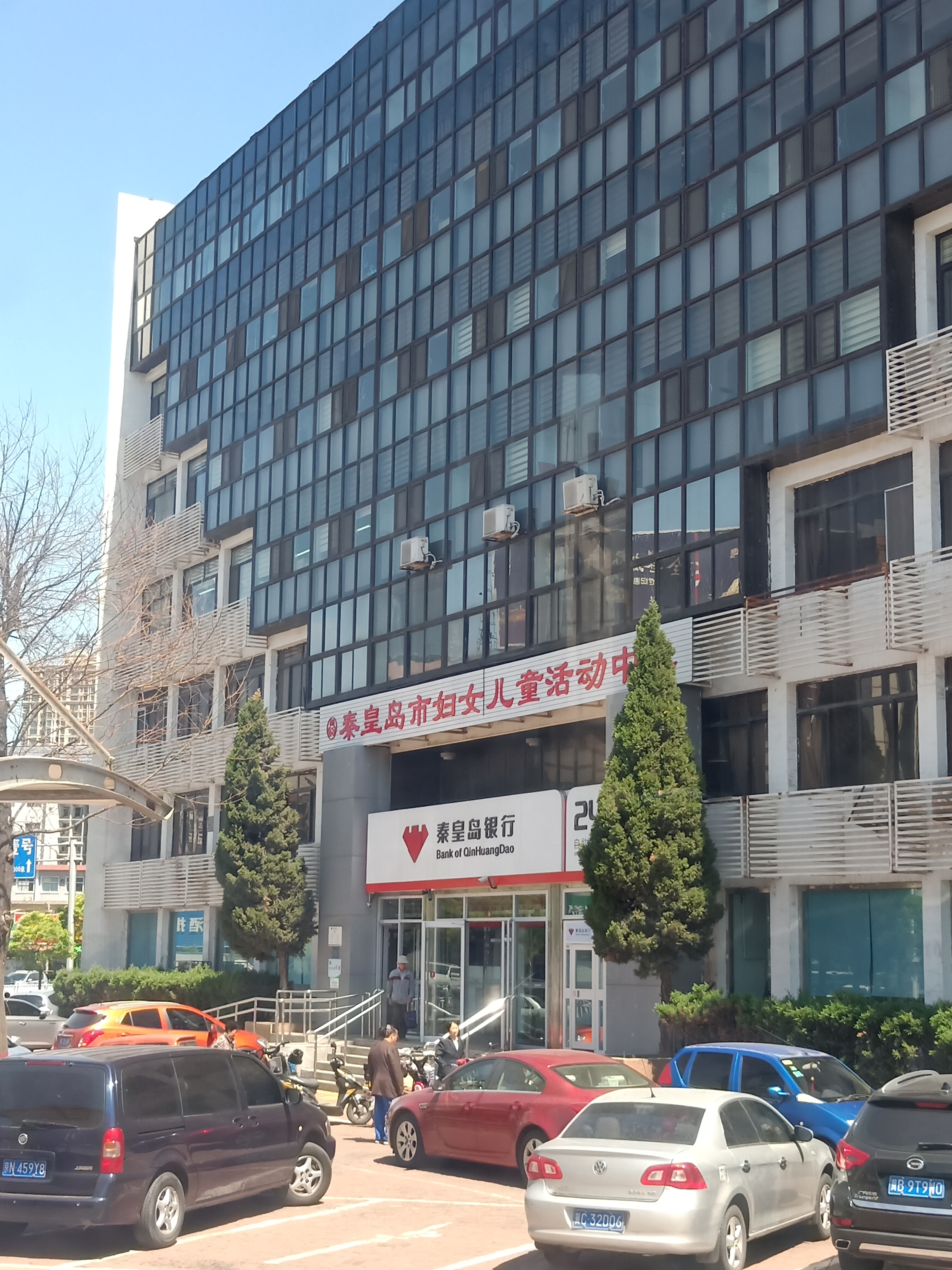 粵語: 秦皇島婦女兒童活動中心